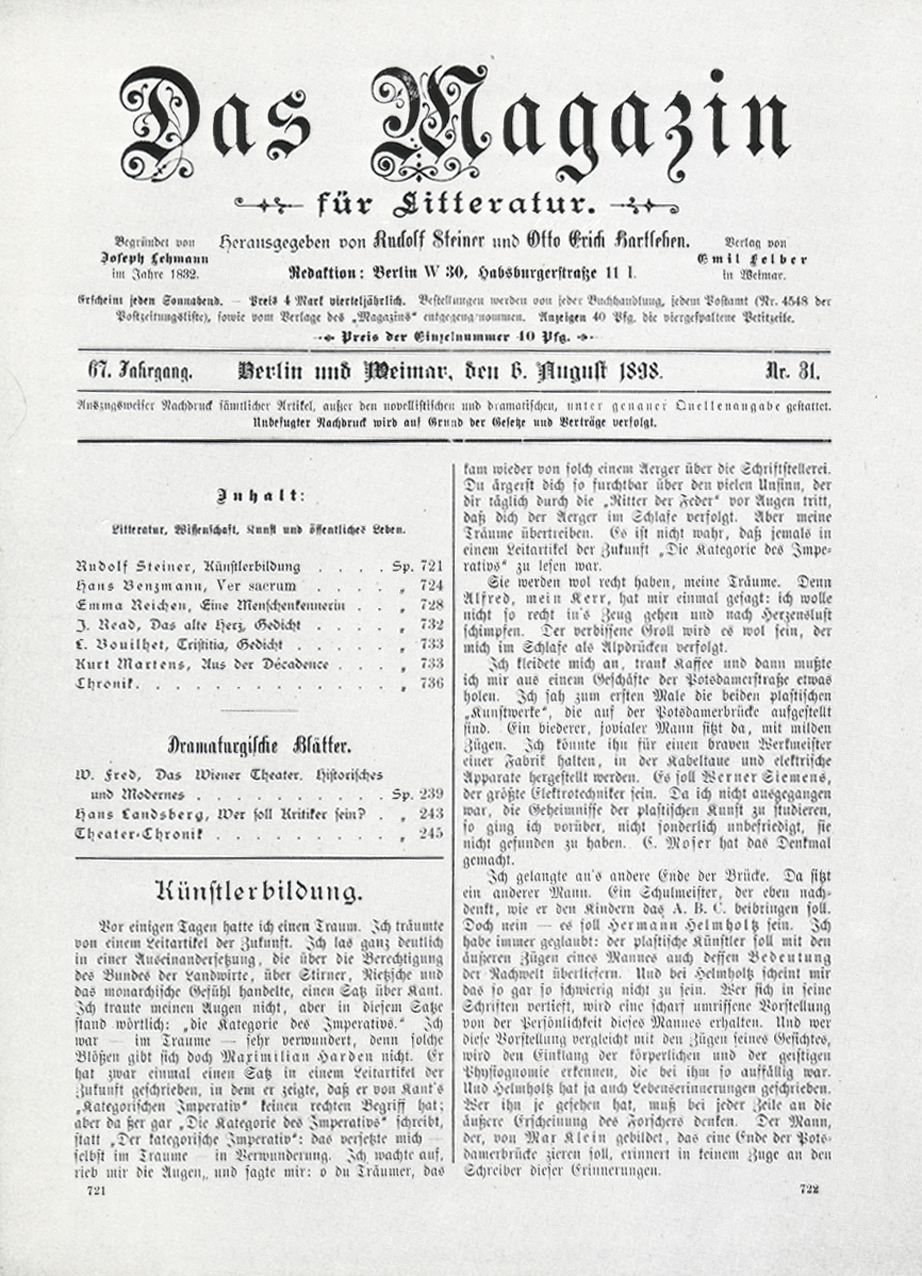 Abbildung Titelseite "Magazin für Litteratur" von 1898